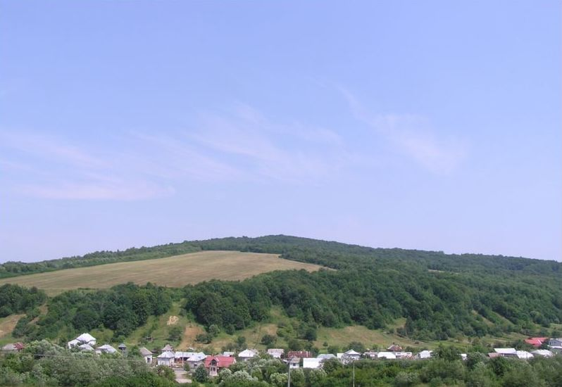 DescriptionCelkový pohľadDate25 June 2006SourceOwn workAuthorAndrej BelovežčíkPermission (Reusing this file) anoCelkový pohľad